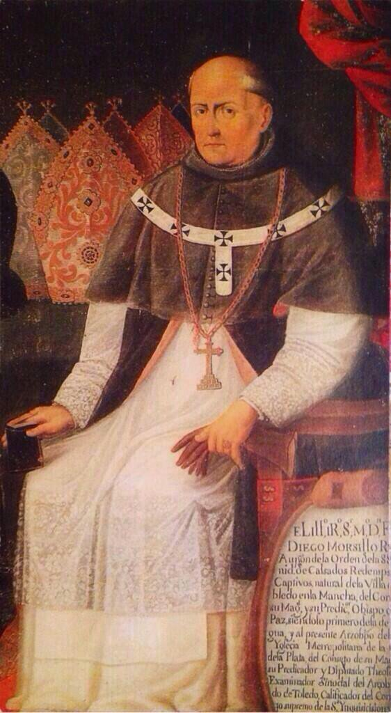 Diego Morcillo Rubio de Auñón (1642-1730) Virrey del Perú y Arzobispo de Lima